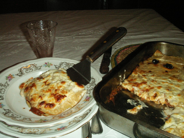 Lasagne al forno servite nel piatto con la paletta